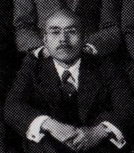 Takesaki Takeo is an Imperial Japanese Navy Captain